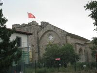 Burg von Cizur Menor